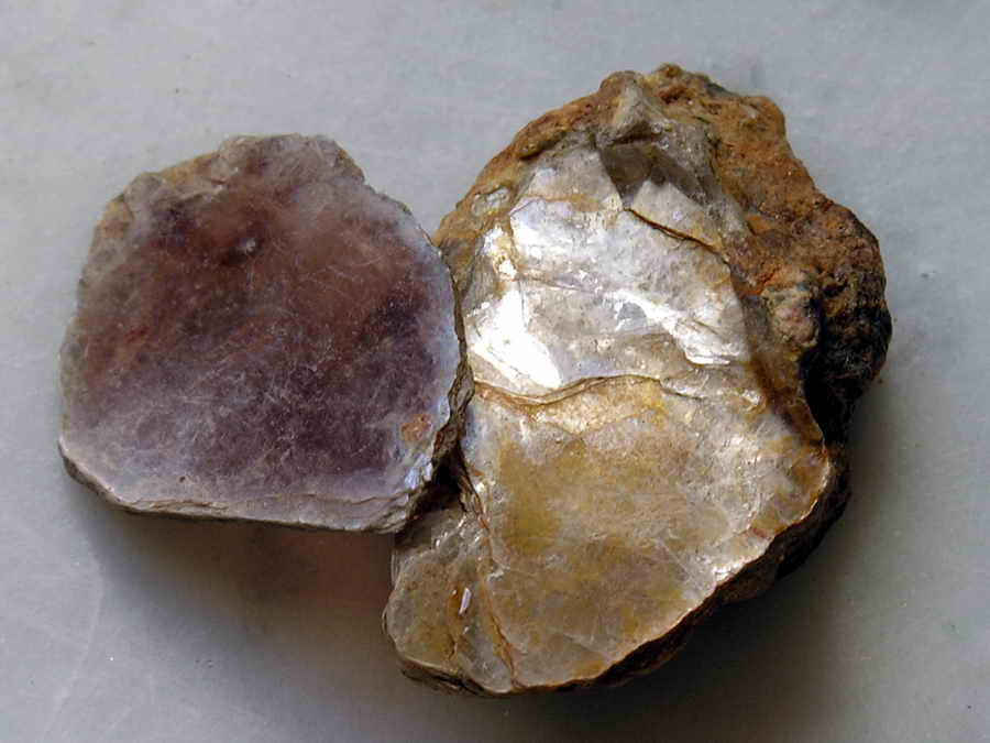 mineral. Nikon E-8800